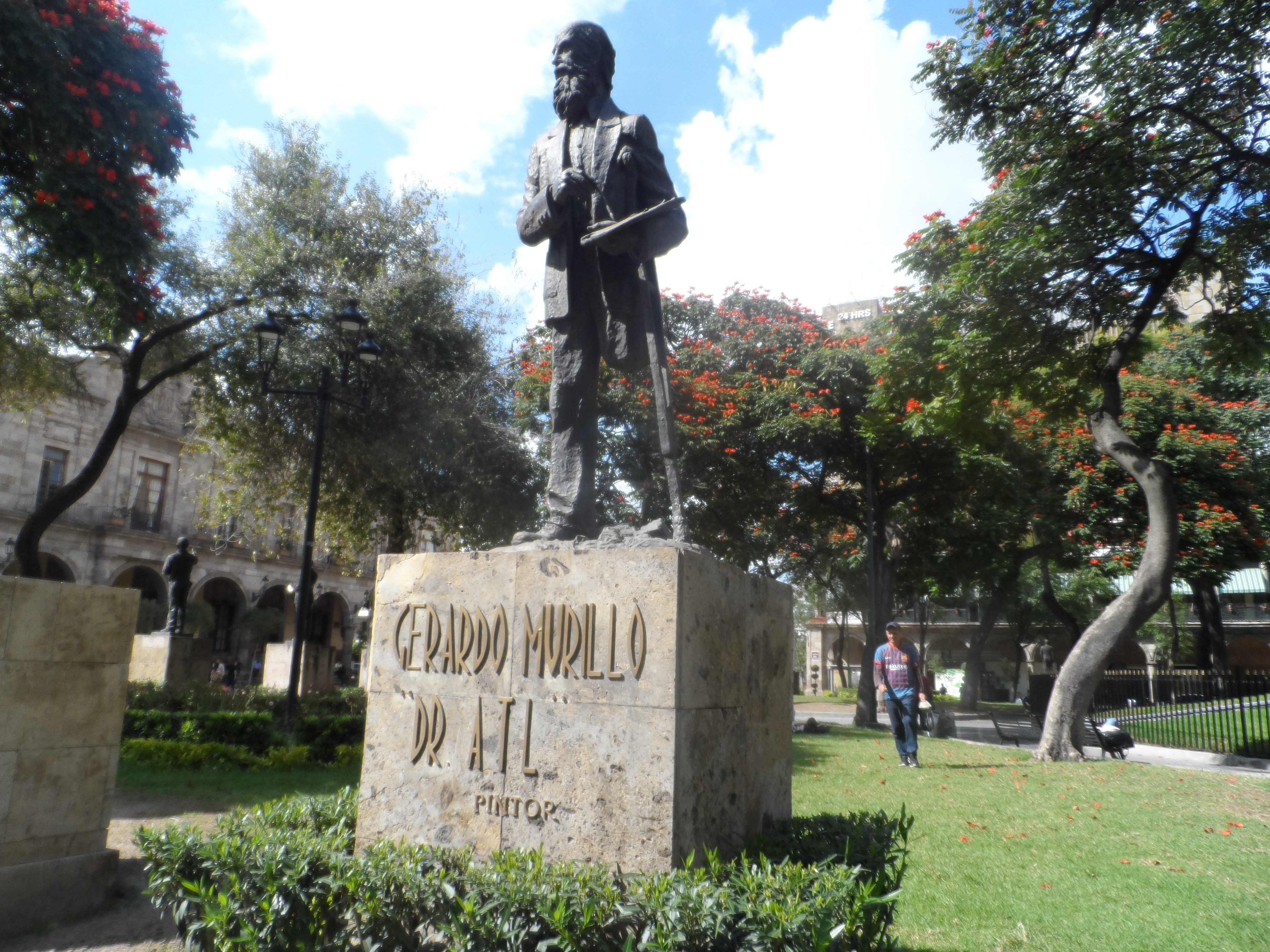 Estatua del pintor jalisciense Gerardo Murillo "Dr. Atl" en la "Rotonda de los Jaliscienses Ilustres".